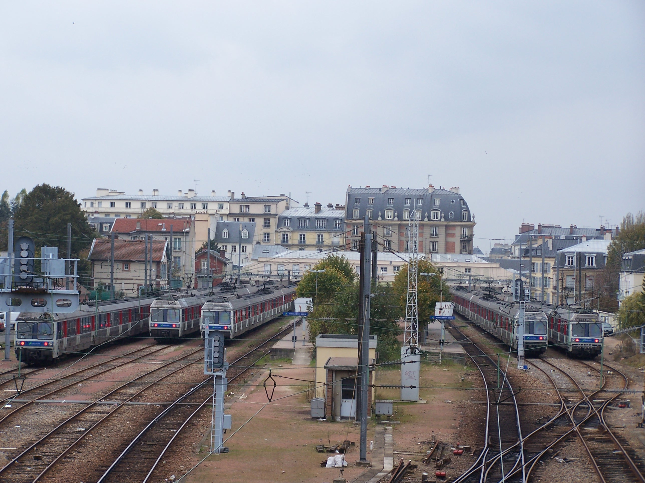 Gare Rive Droite à Versailles (Yvelines, France), voies